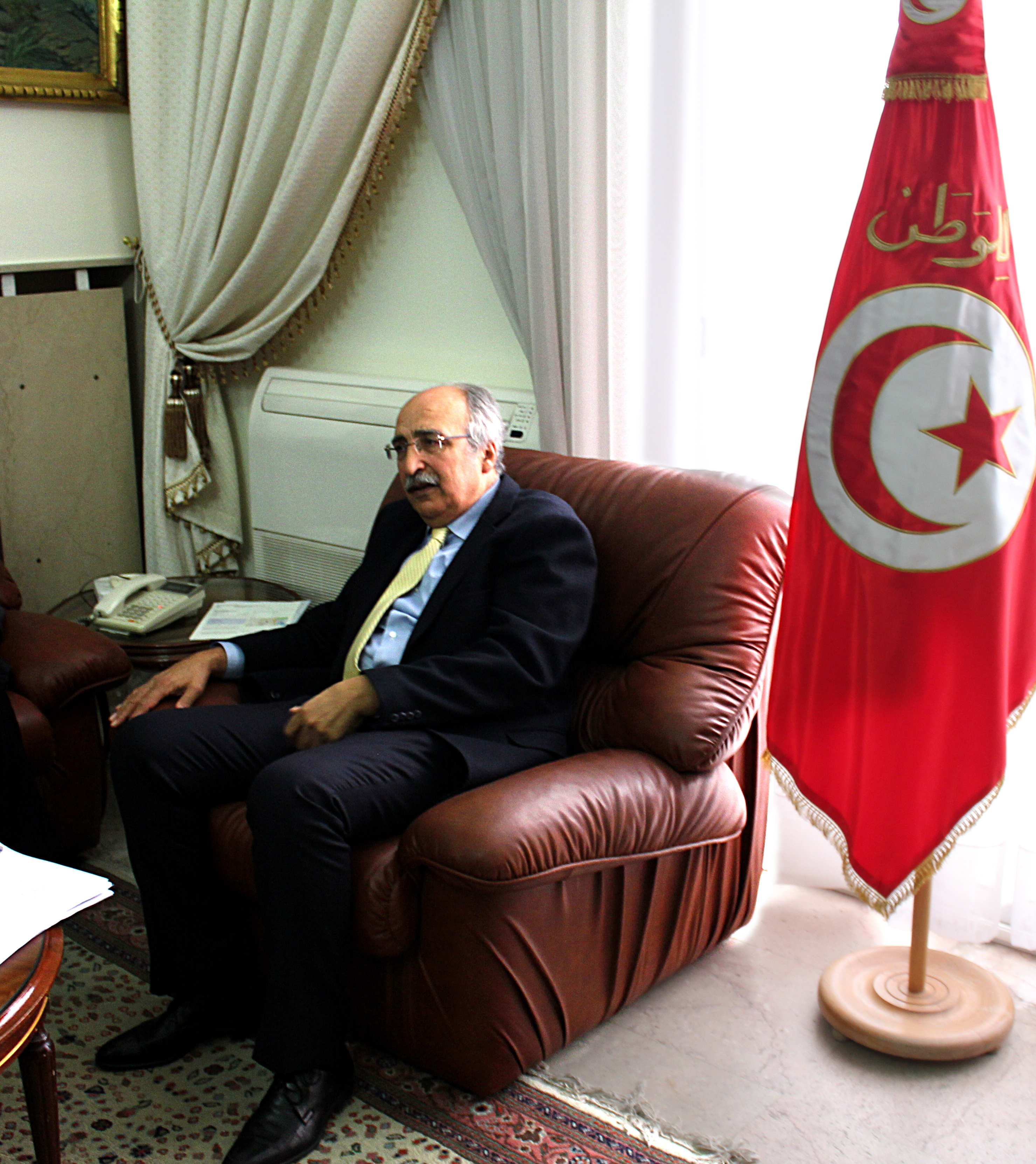 Réunion d'une délégation de la ville de Sayada avec M. le Ministre de la gouvernance à propos de l'initiative de la ville de Sayada dans l'OpenData, l'OpenGov et la démocratie participative